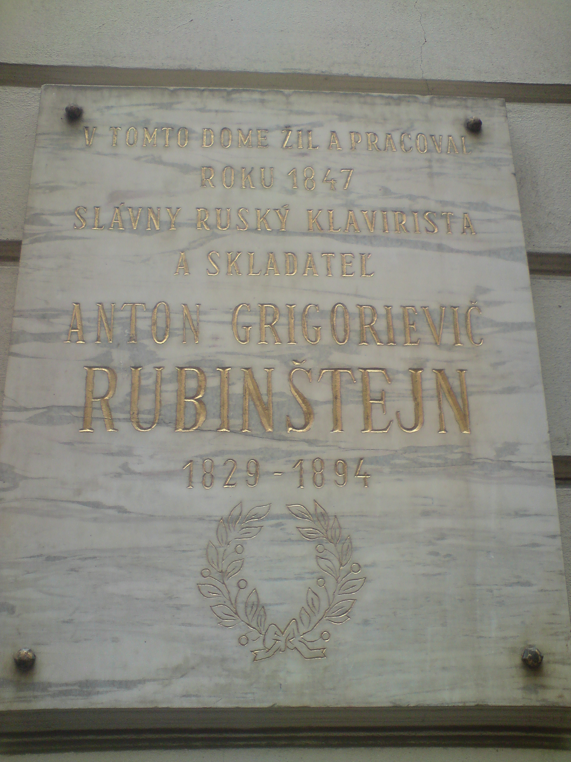 Kutscherfeldov palác, Sedlárska, Bratislava